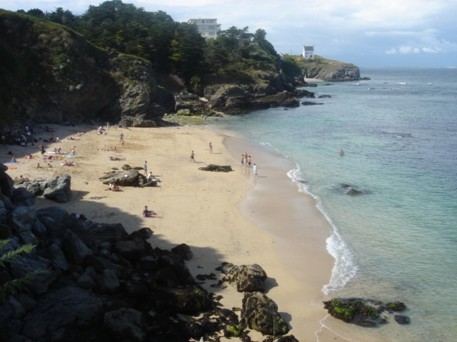 Une des nombreuses plages, ici Castoul un après-midi d'affluence, à Belle-Île-en-Mer (56). Au-dessus, l'ancienne ville du baron de l'Espee.